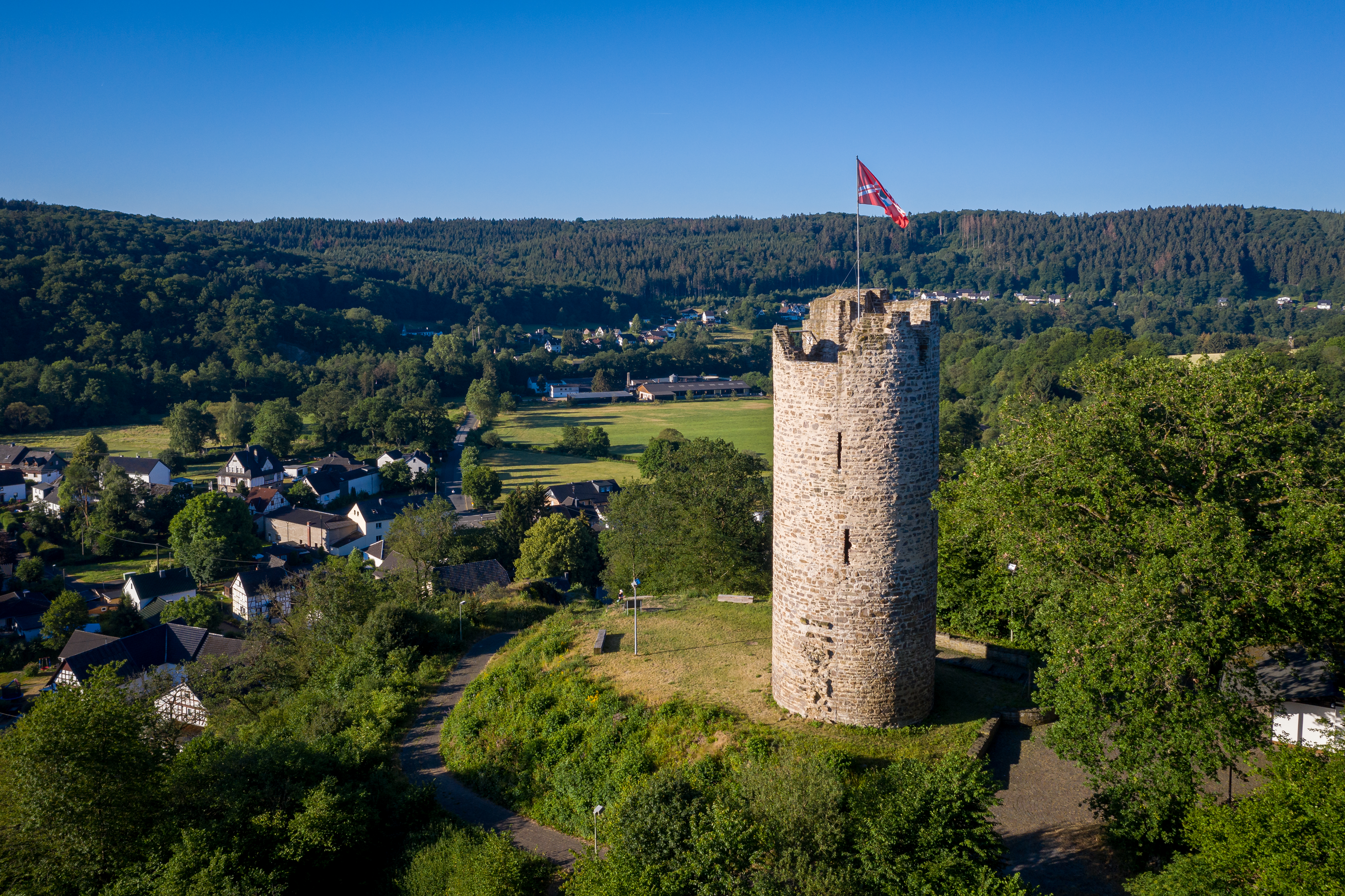 Burgfried Burg Lahr in Burglahr, Westerwald